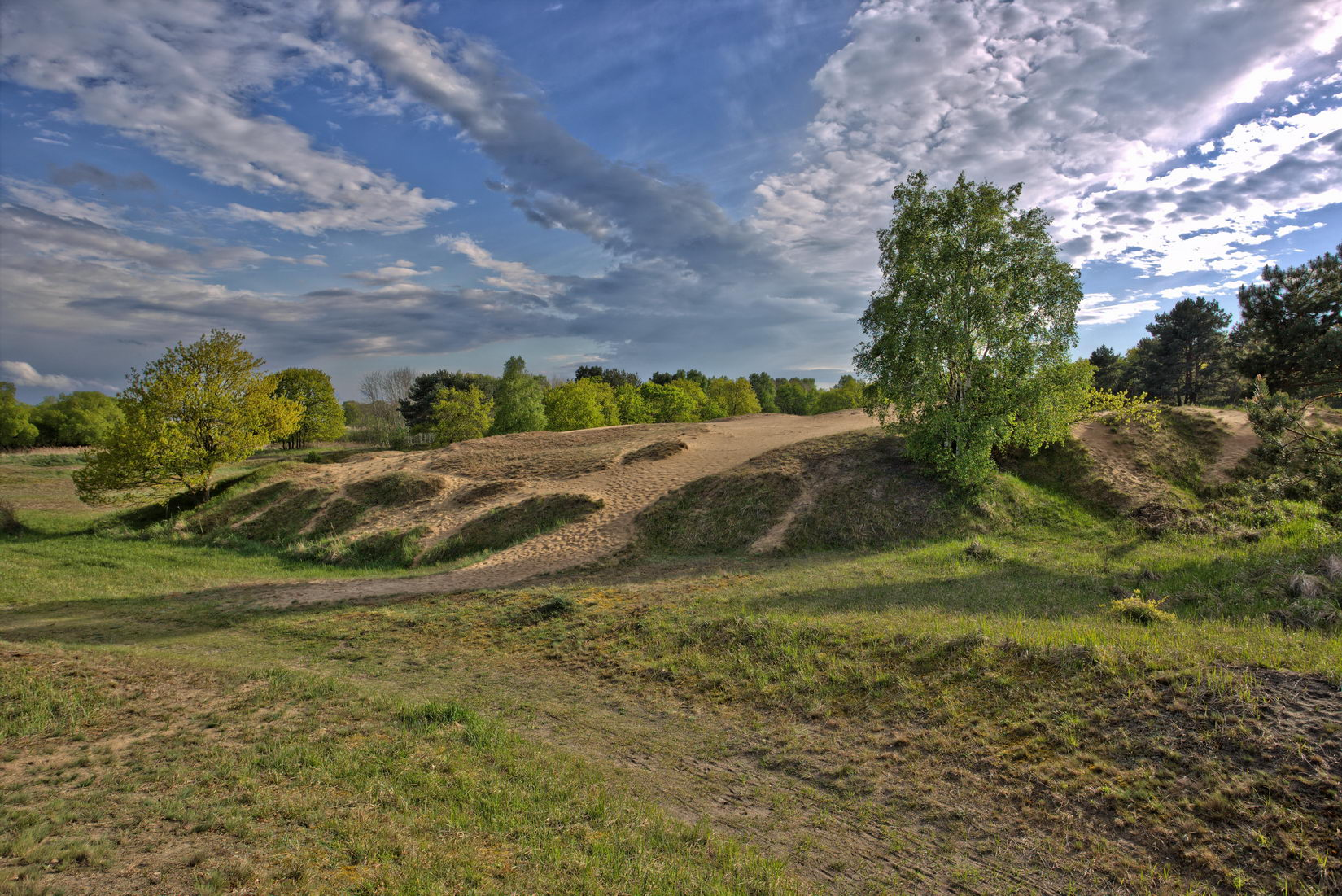 Relikt der Eiszeit